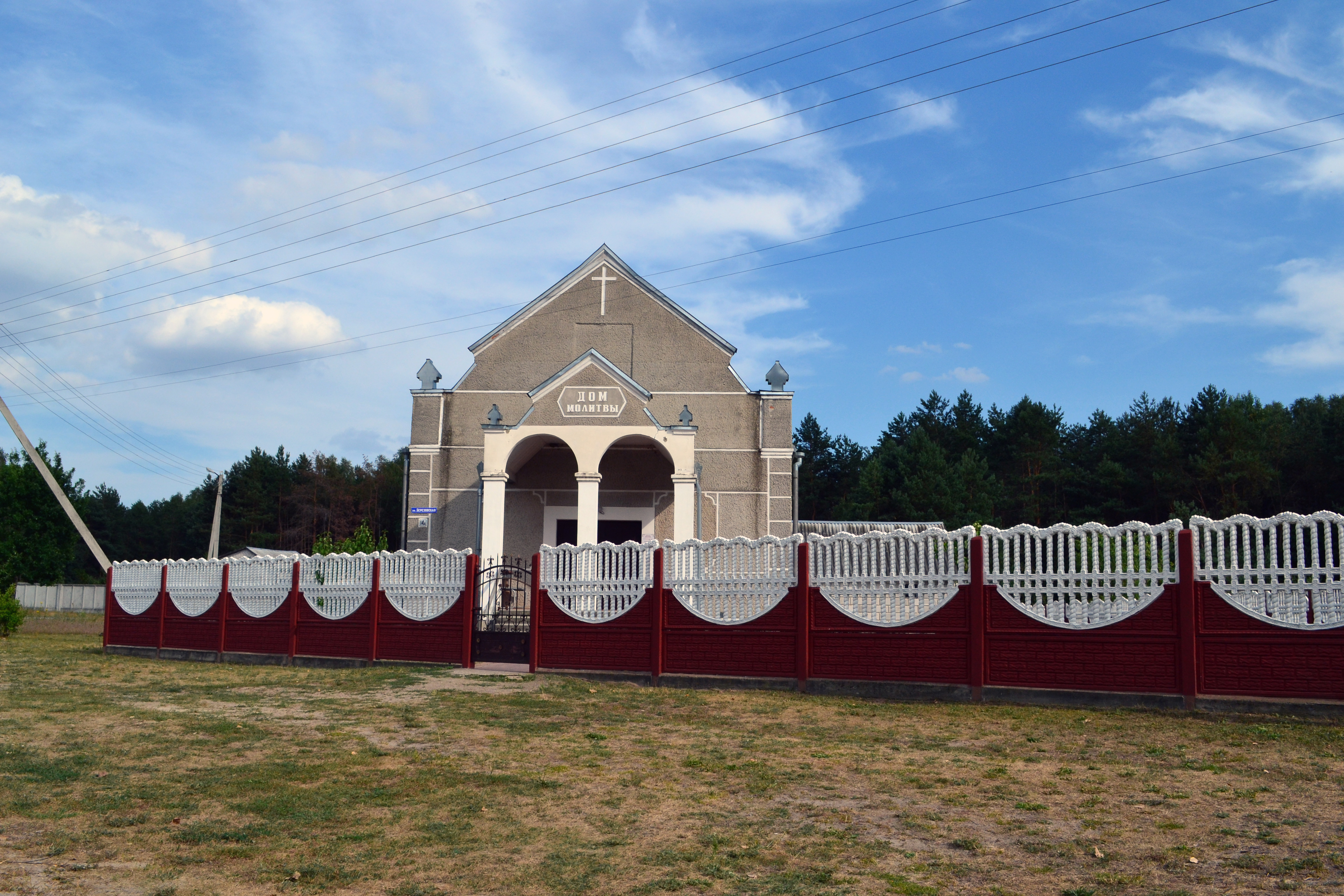 Бярозаўскай, 14а.